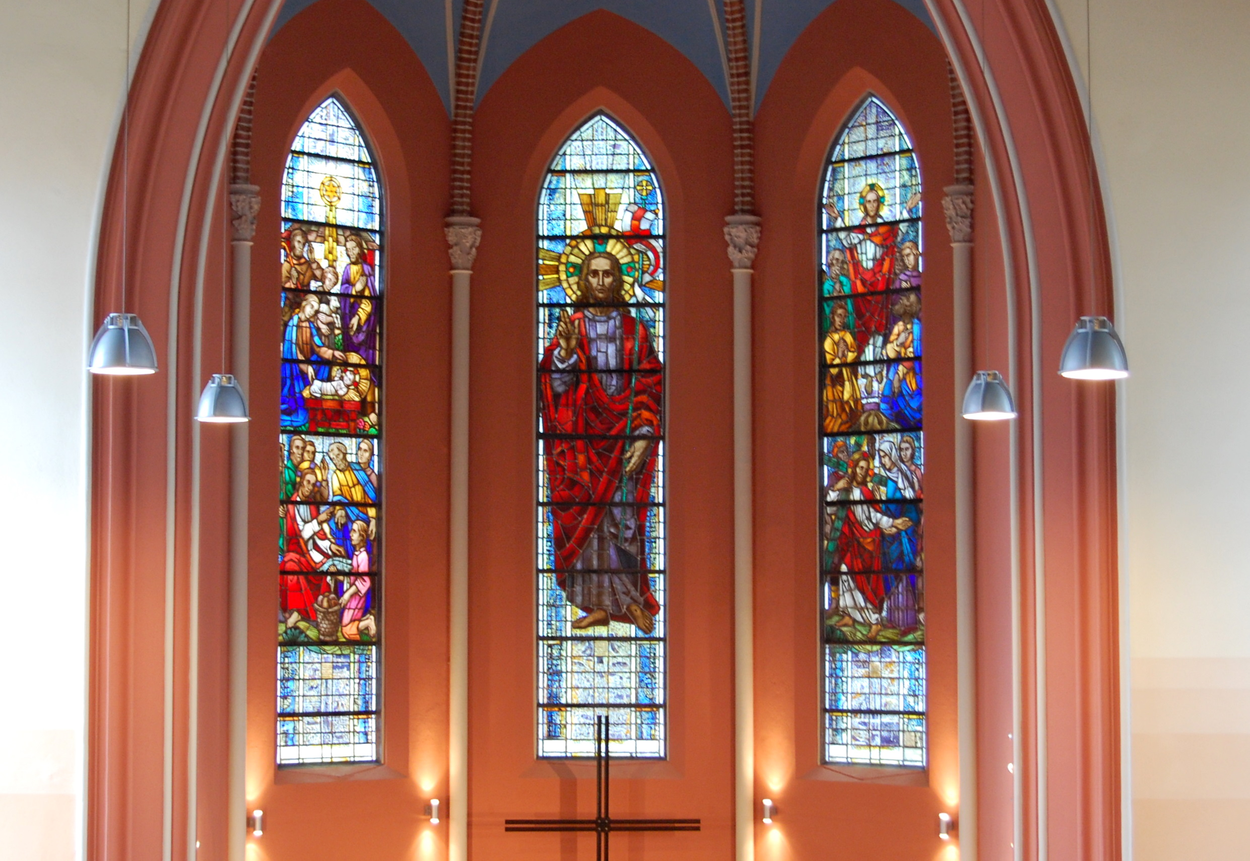 Fenster der Sankt-Gertraud-Kirche Salbke nach der Neugestaltung 2011